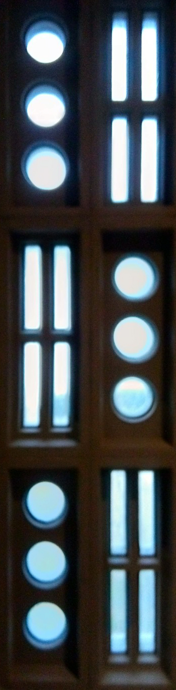 Kirchenfenster "Betonlichtkammern" von St. Marien